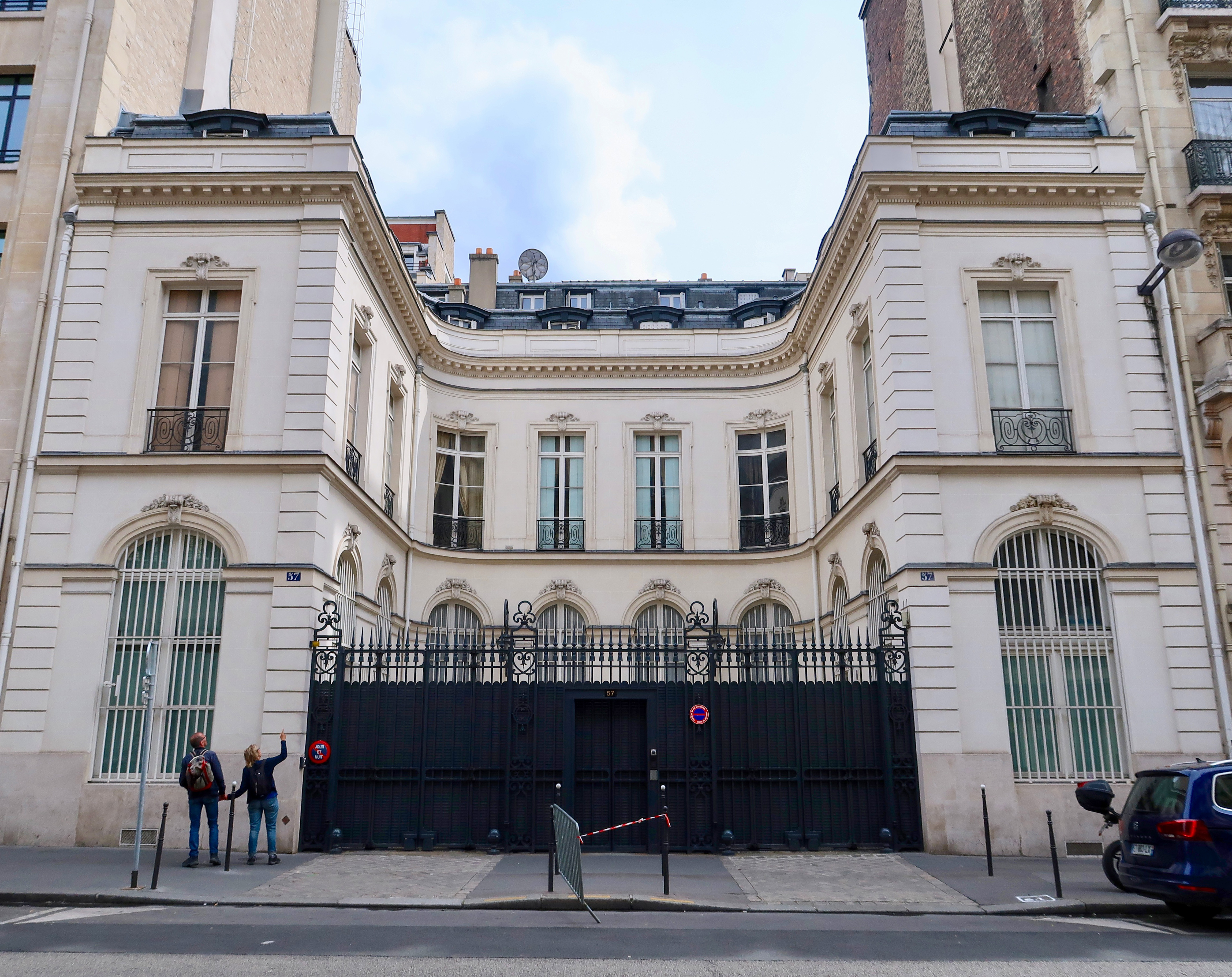 Maison De Wailly, 57 rue La Boétie (Paris, 8e).